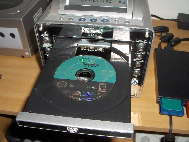 De DVD lade van de Pansonic Q.